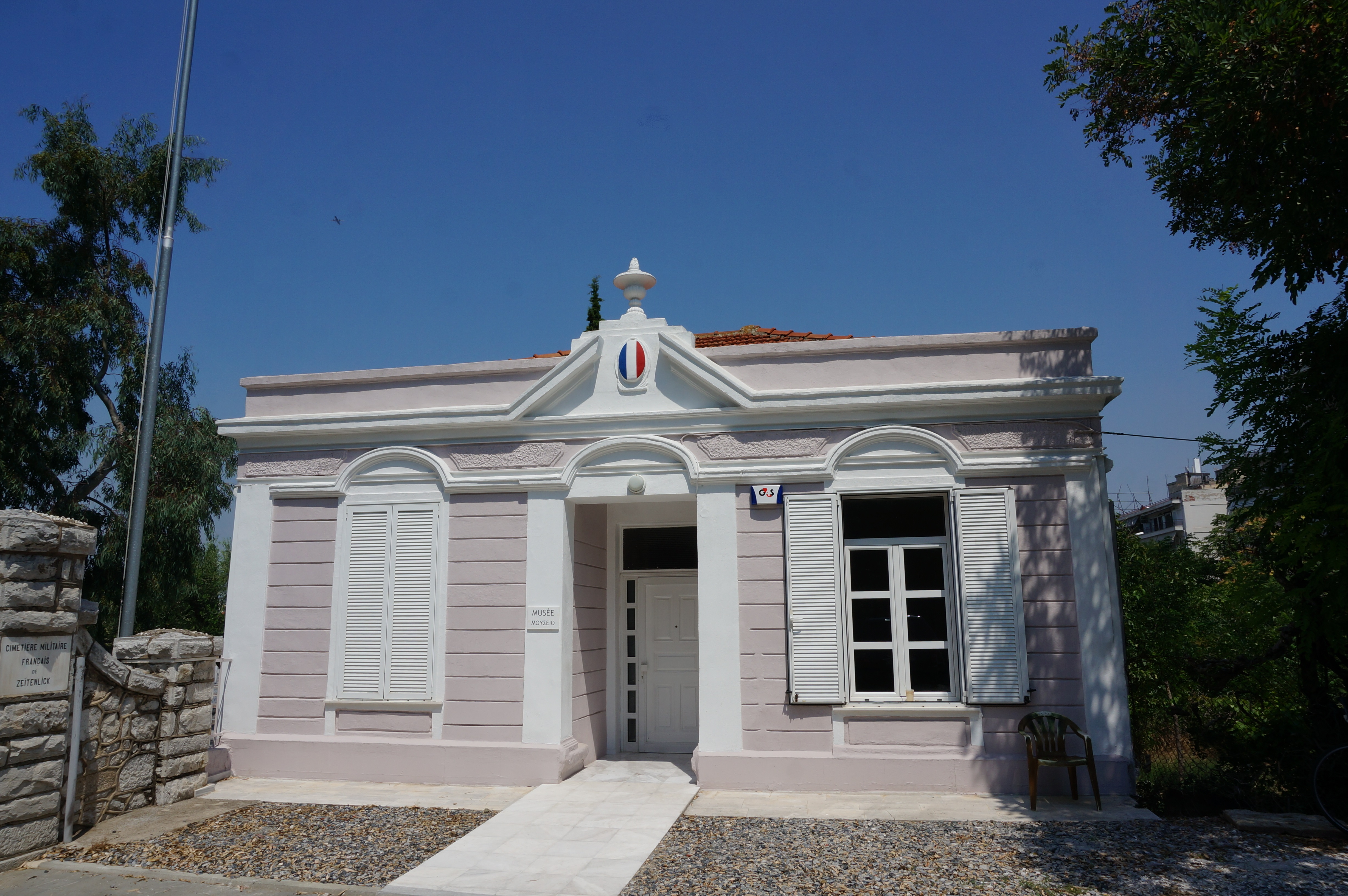 Musée du Centenaire de 14 - 18.